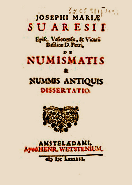 De numismatis & nummis antiquis dissertatio Dissertation sur les monnaies et médailles antiques